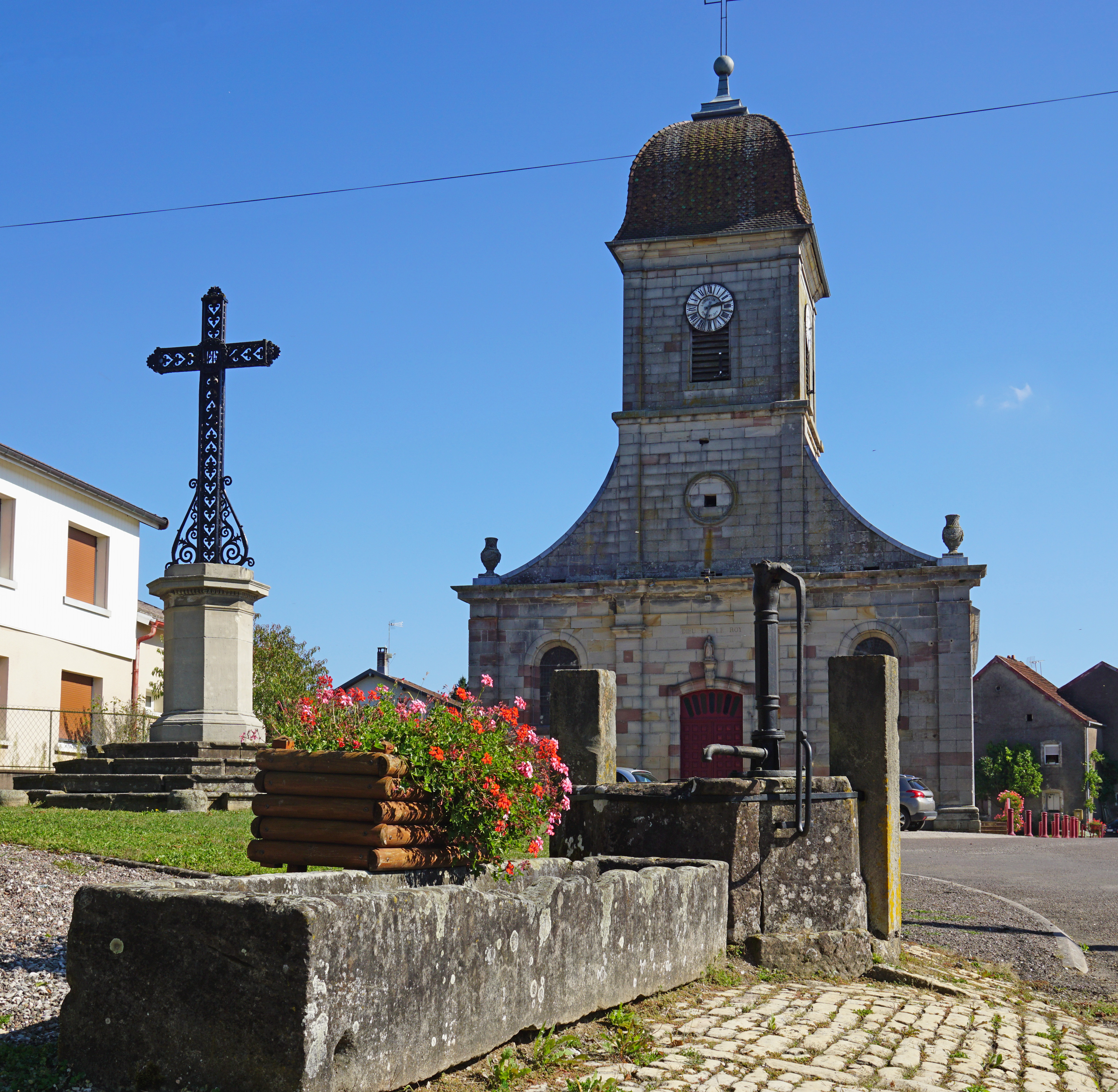 L'église d'Amblans.